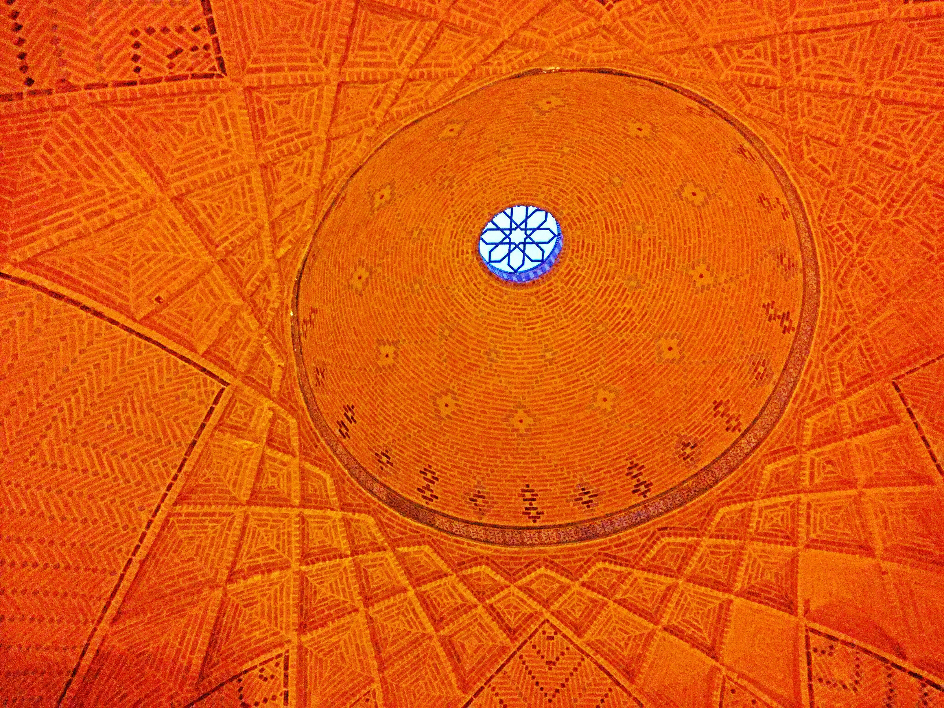 کاروان‌سرای سعدالسلطنه